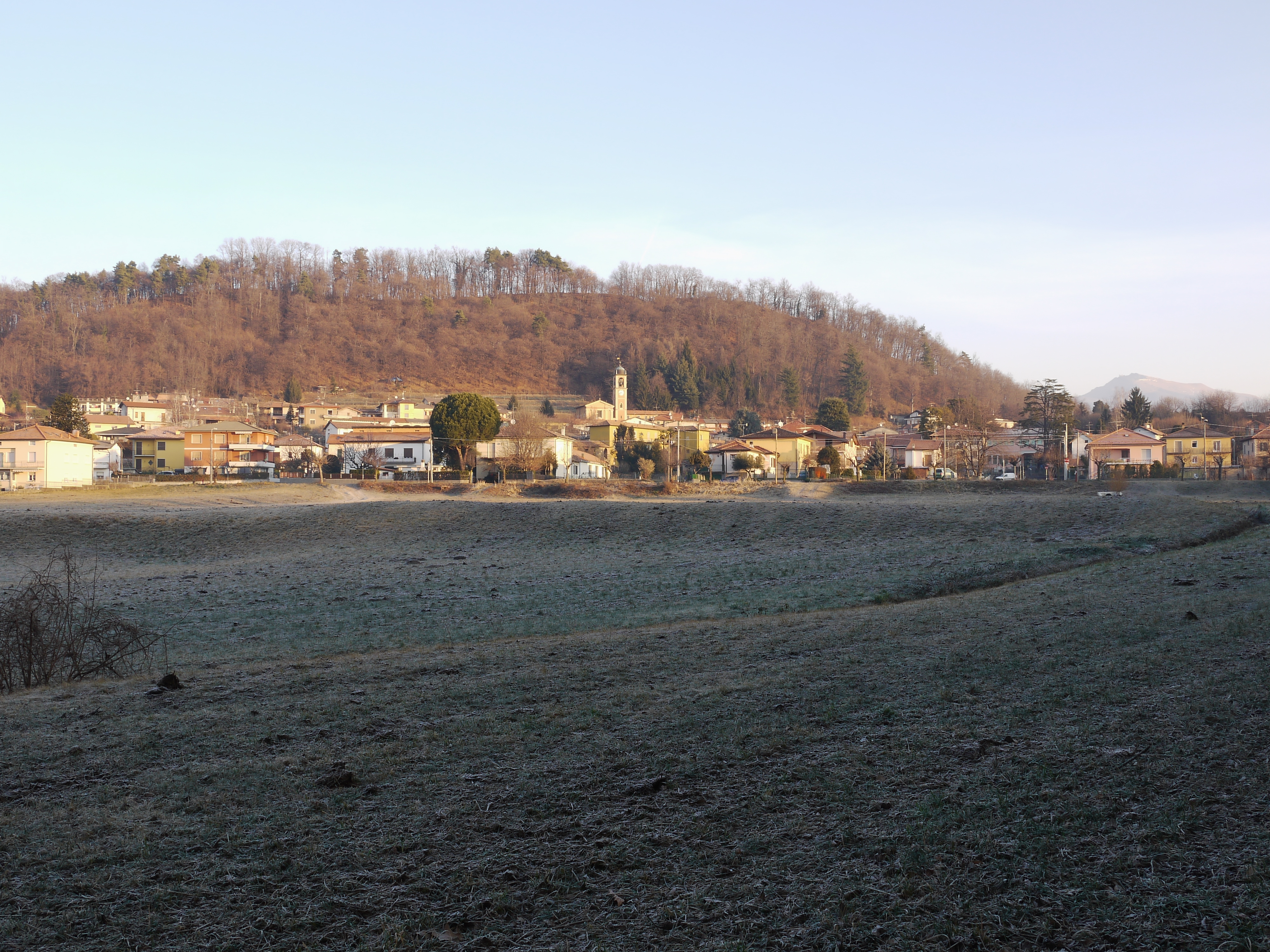 Panorama di Bizzarone